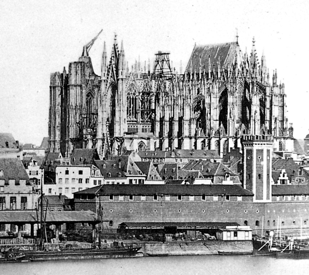 Vor dem unfertigen Dom: Zollverwaltung „Am Bollwerk“ mit achteckigem Zinnenturm.